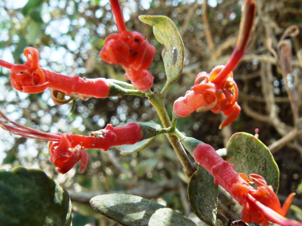 הרנוג השיטים בנגב